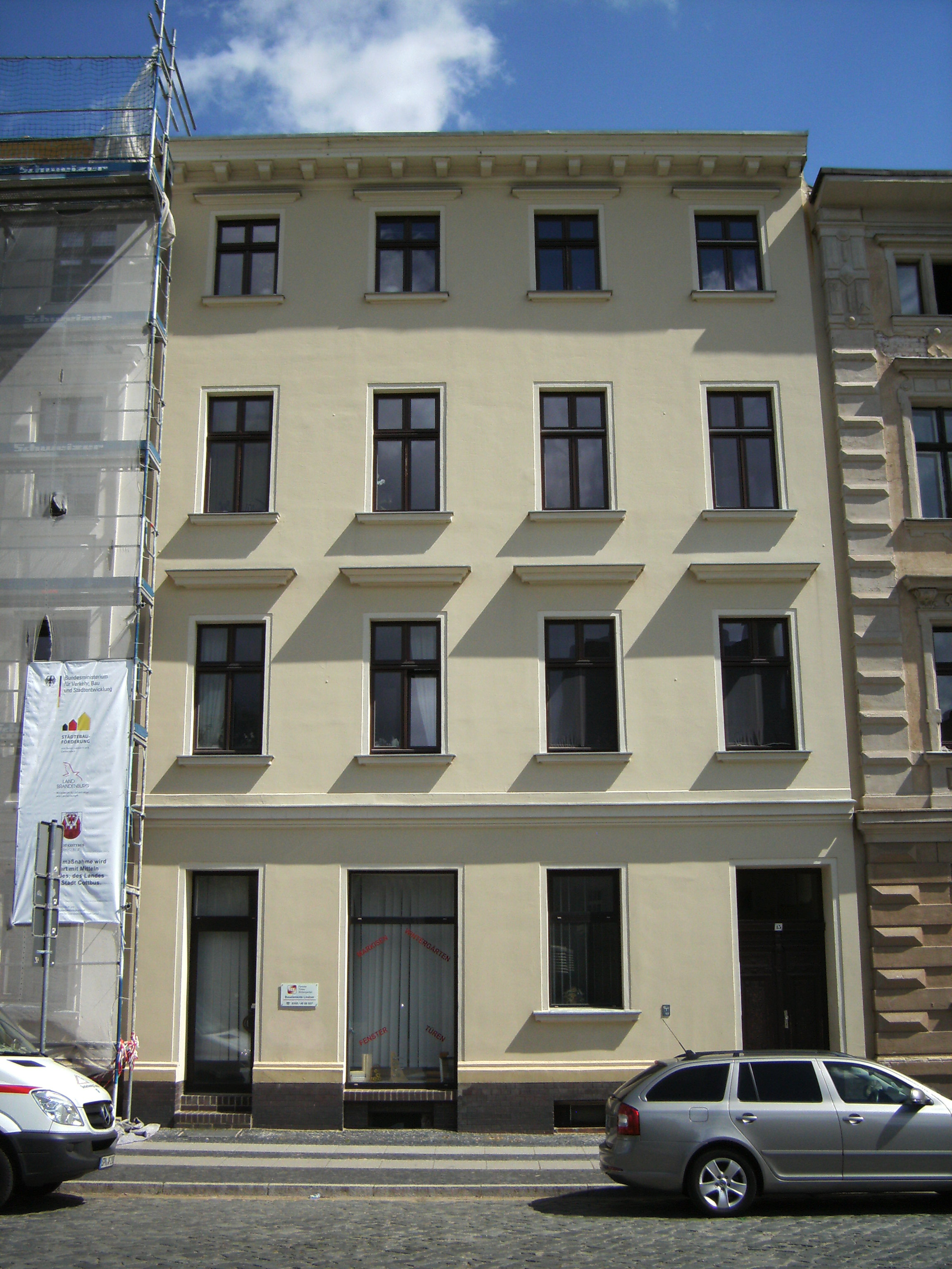 Wernerstr. 15